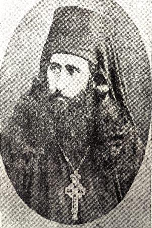 Серафим Скарулис